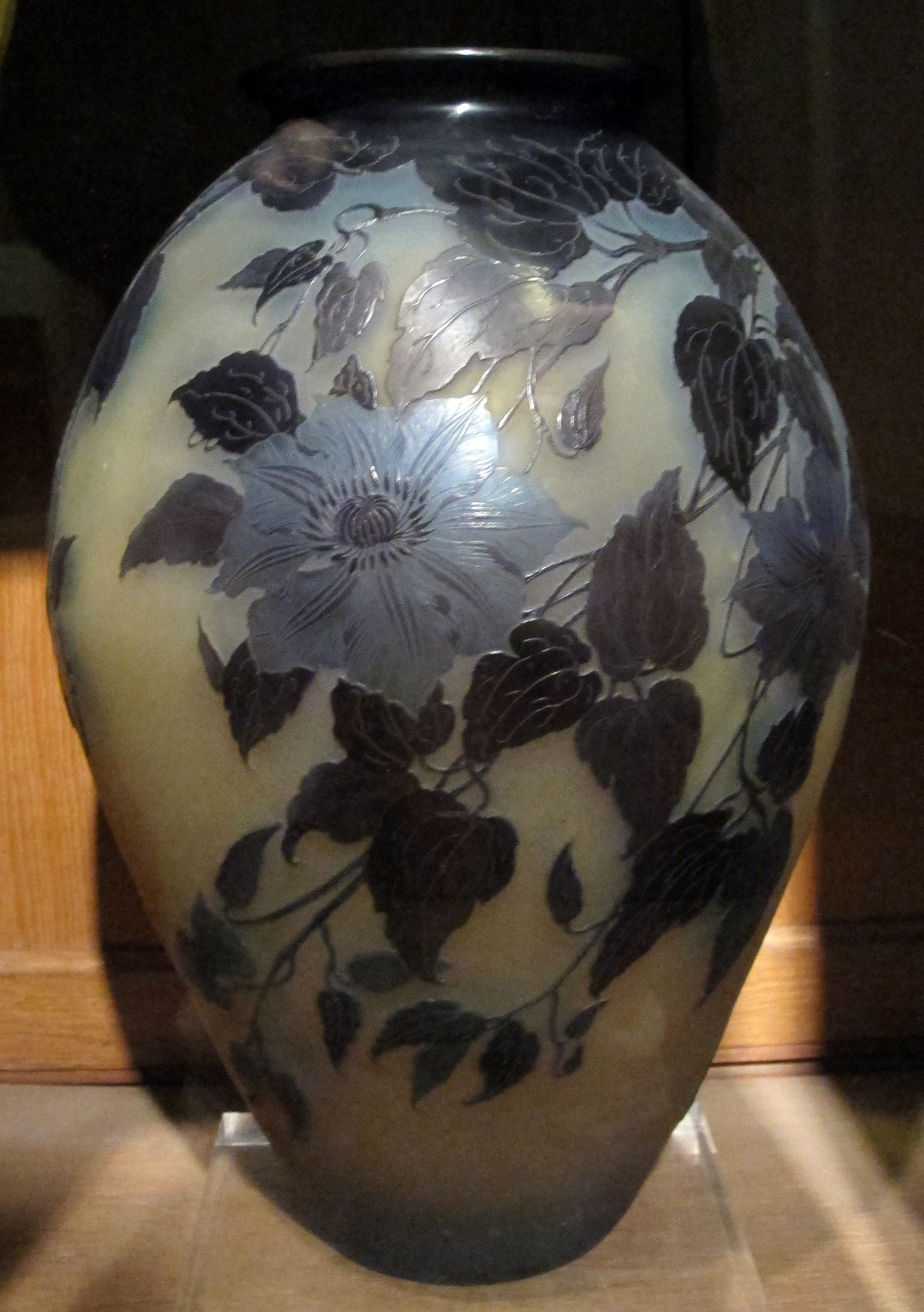 Brooklyn Museum